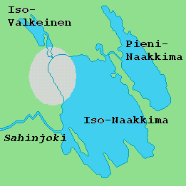 Iso-Naakkiman järvi ja kraatteri * Sjön Iso-Naakkima med nedslagskratern * Lake Iso-Naakkima /w the impact crater